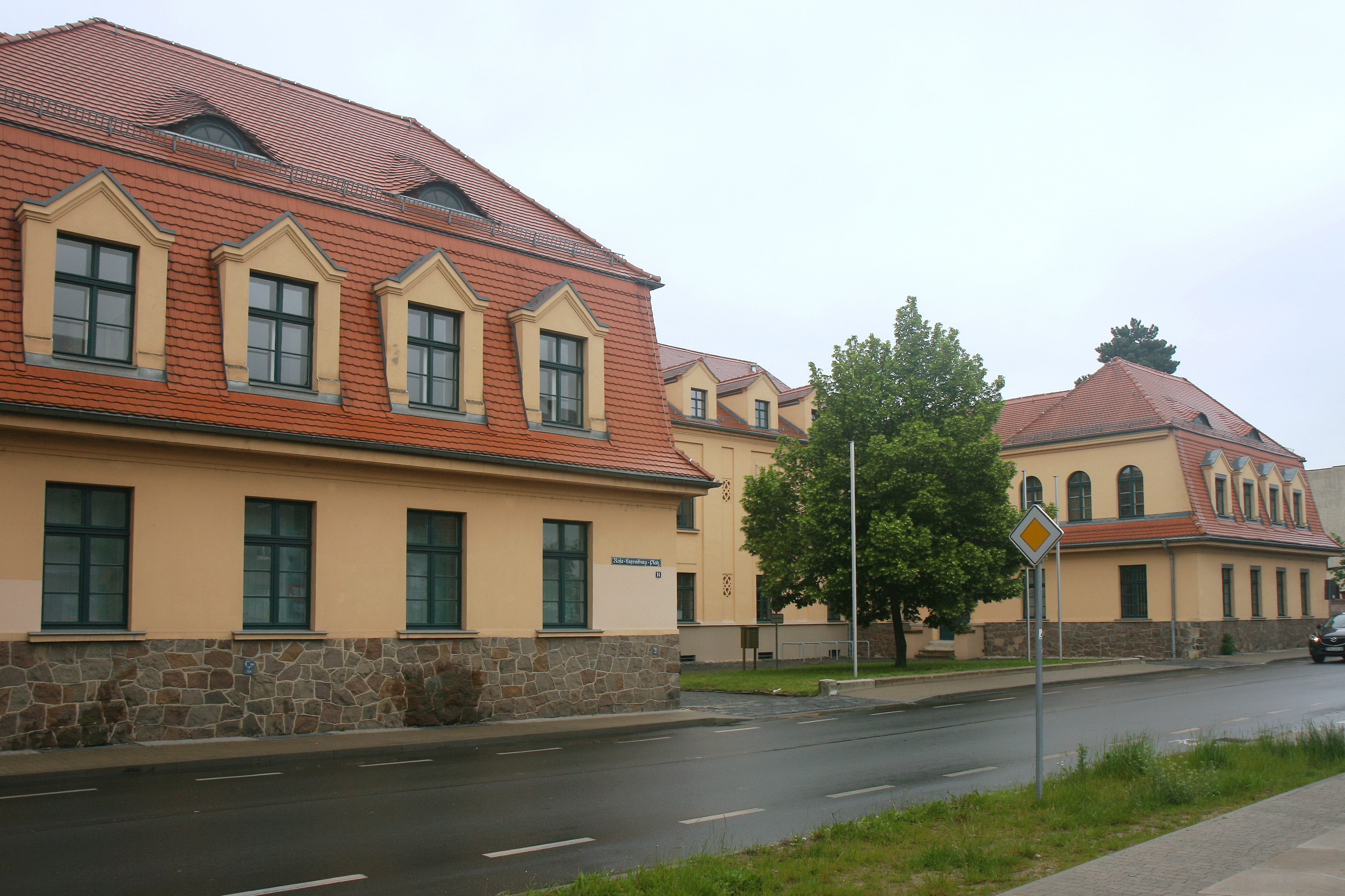 Amtsgericht Torgau, Rosa-Luxemburg-Platz 14 in Torgau. This is a photograph of an architectural monument. 09286524